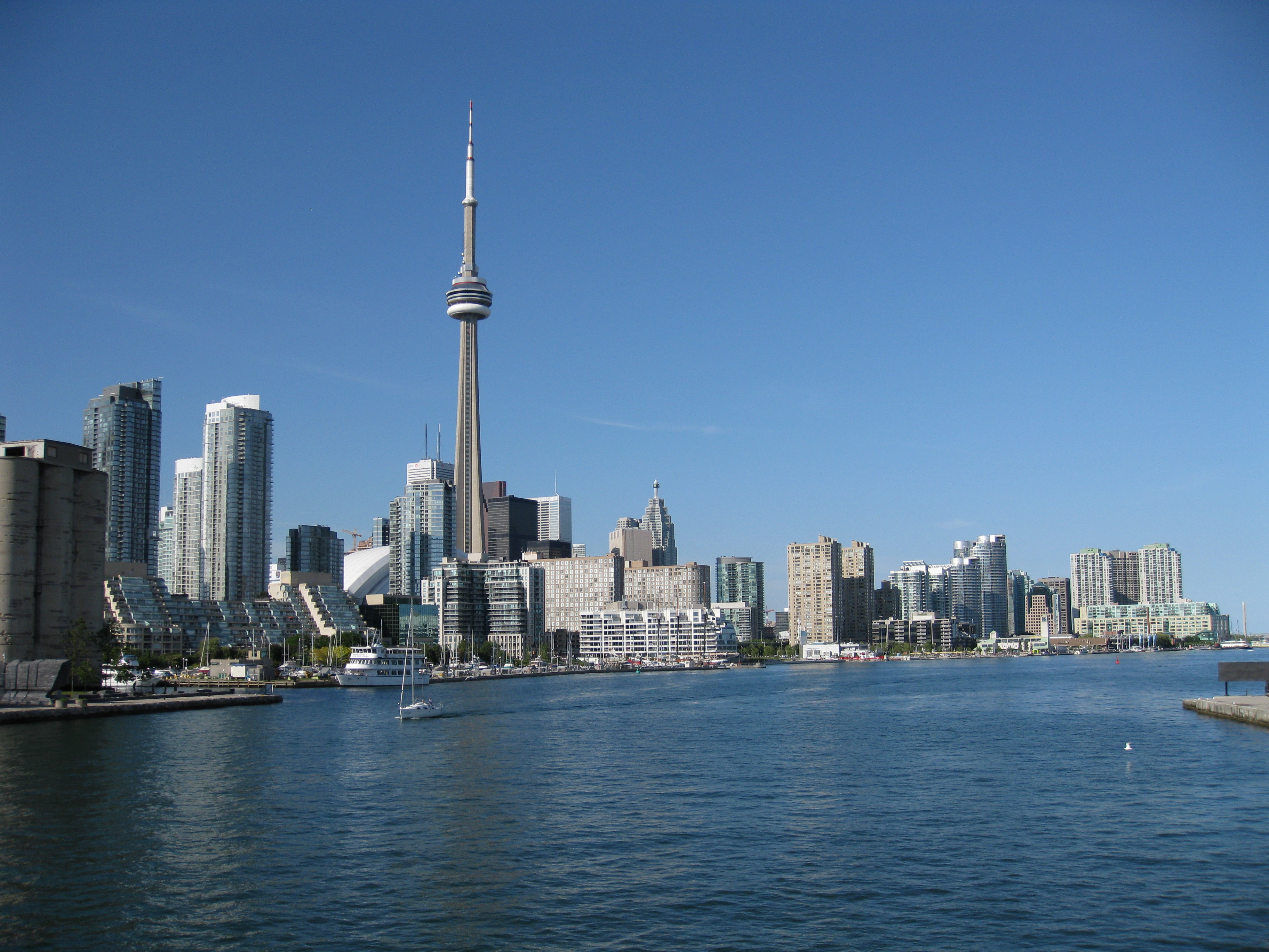 Toronto, Canada